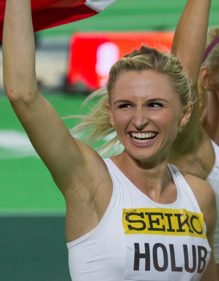 5182 pools 4x400m team